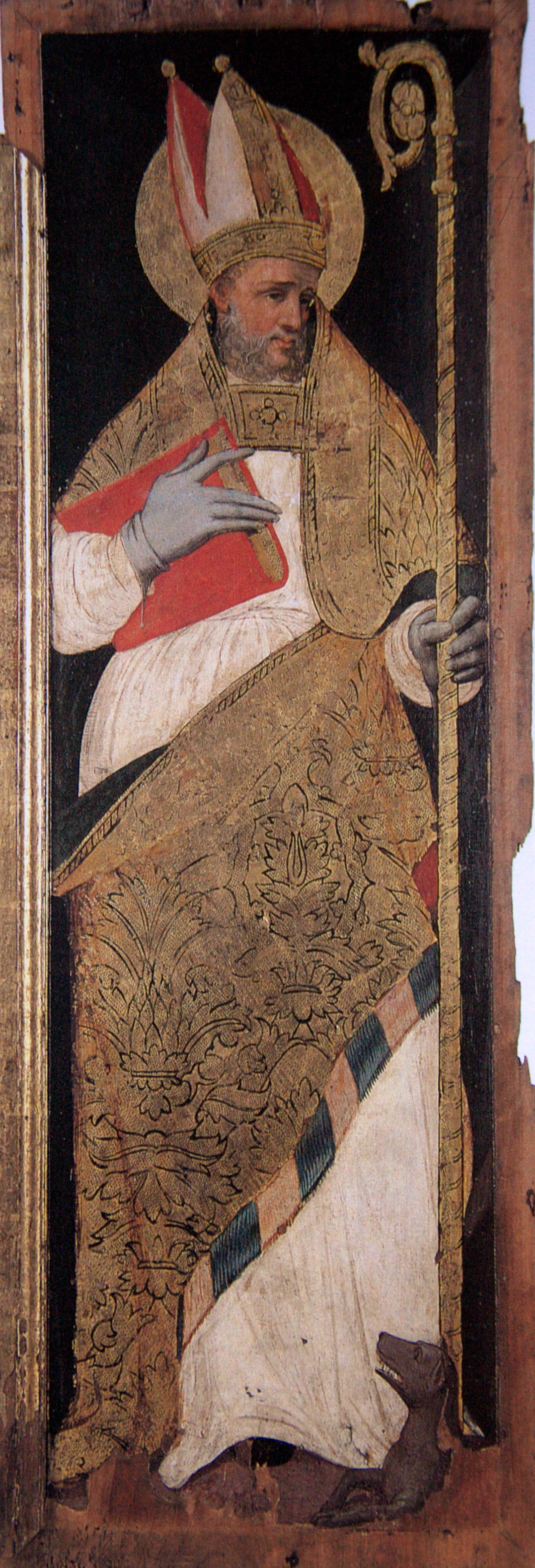 Sant Llop, taula procedent de l'església del Figaró. És una obra anònima, que Rafael Cornudella ha atribuït a Jaume Forner. Museu Diocesà de Barcelona, Catalunya.